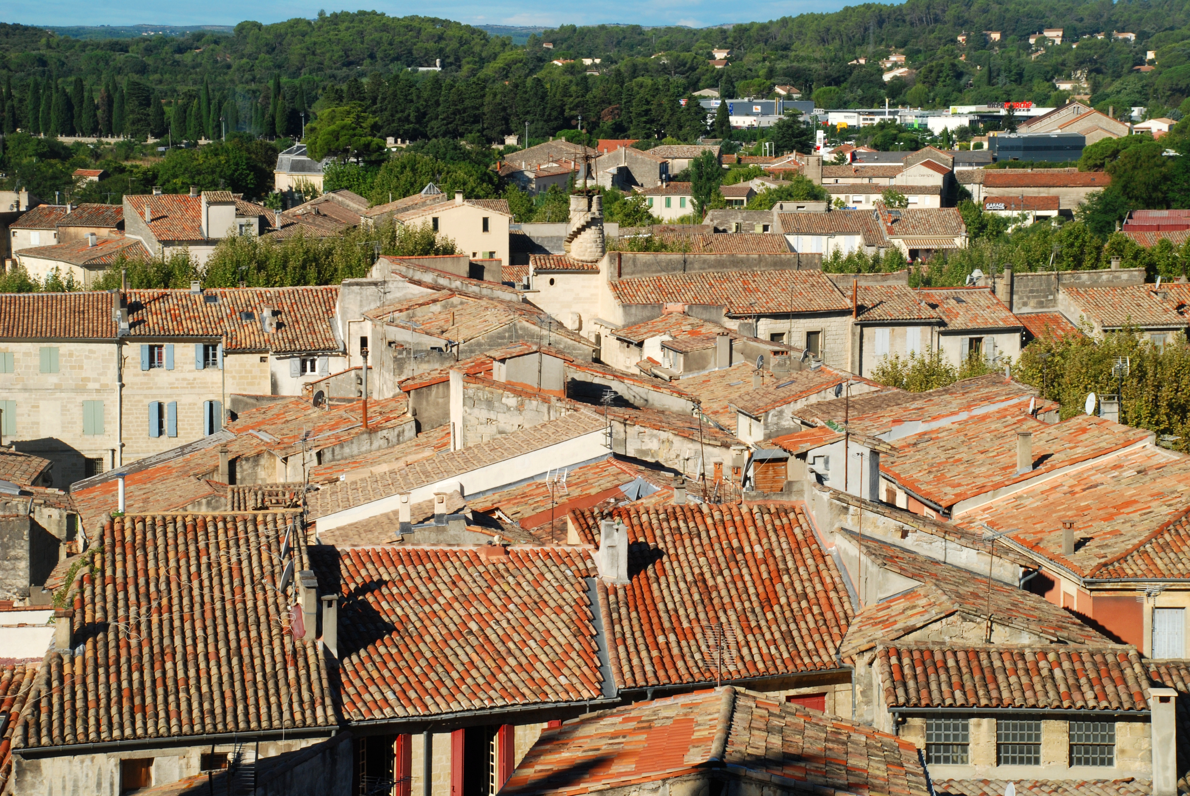 France - Gard - Sommières - Vue sur les toits de la ville et le beffroi .